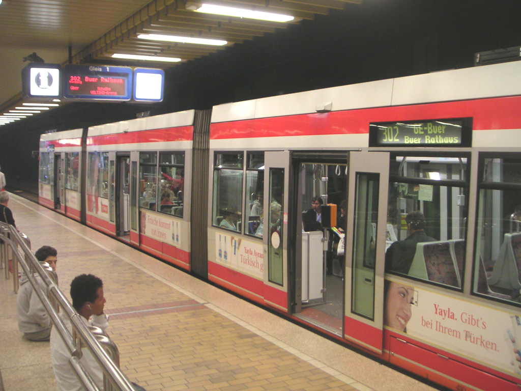 Beschreibung: Gelsenkirchen Hbf - Stadtbahn-Station mit der Linie 302 Richtung Buer Rathaus. Description: Gelsenkirchen main station - underground; Line 302 - direction buer Rathaus Quelle/Source: Selbst fotografiert am 20. September 2005 Fotograf: Marc Schuelper